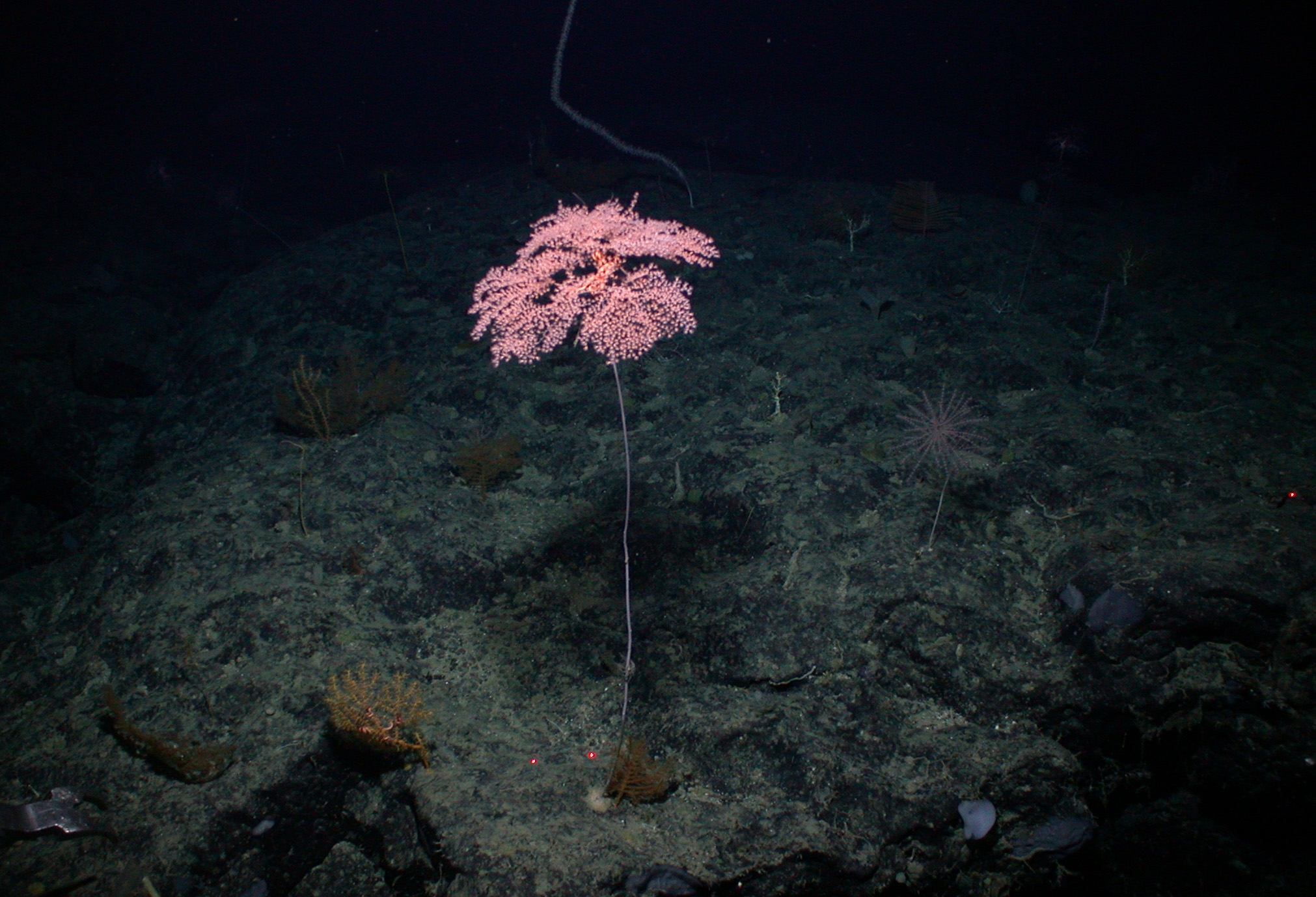 Metallogorgia melanotrichos en montaña marina de Nueva Inglaterra. Expedición de NOAA de 2005